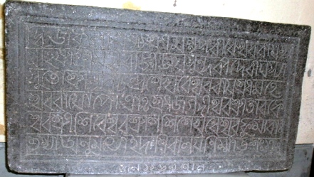 Bengali letters of 1813, engraved on stone, being preserved in Rajshahi